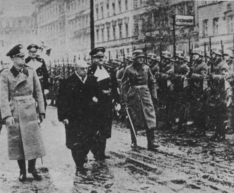 Der tschechische Staatspräsident Emil Hácha beim Abschreiten einer Ehrenkompanie vor dem Anhalter Bahnhof in Berlin. Dargestellte Personen, vordere Reihe L-R: Ernst Seifert (Kommandant von Berlin), Emil Hacha, Otto Meissner (Chef der Präsidialkanzlei). hintere Reihe L-R: Frantisek Chvalkovsky (tschechischer Aussenminister; nur das Gesicht unverdeckt), Sandro Freiherr Dörnberg (Chef des Protokolls im Auswärtigen Amt)